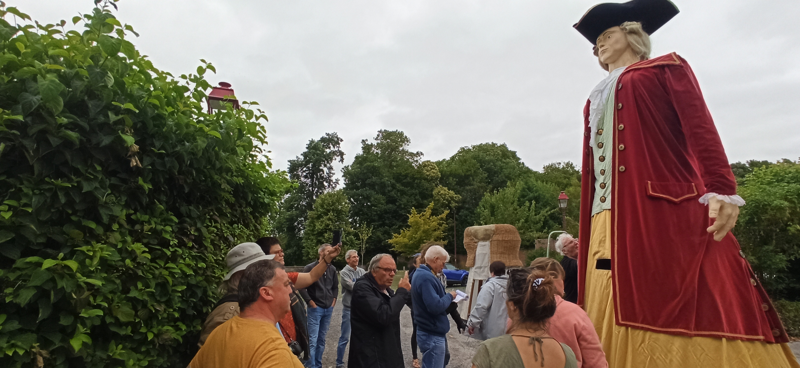 Le géant du Marquis de Traisnel représentant Claude-Constant Jouvenel des Ursins d'Harville en cours de montage à Villers-au-Tertre samedi 4 juillet 2020 par le Foyer des Jeunes et d’Éducation Populaire dans le cadre d'une action de transmission des savoirs.